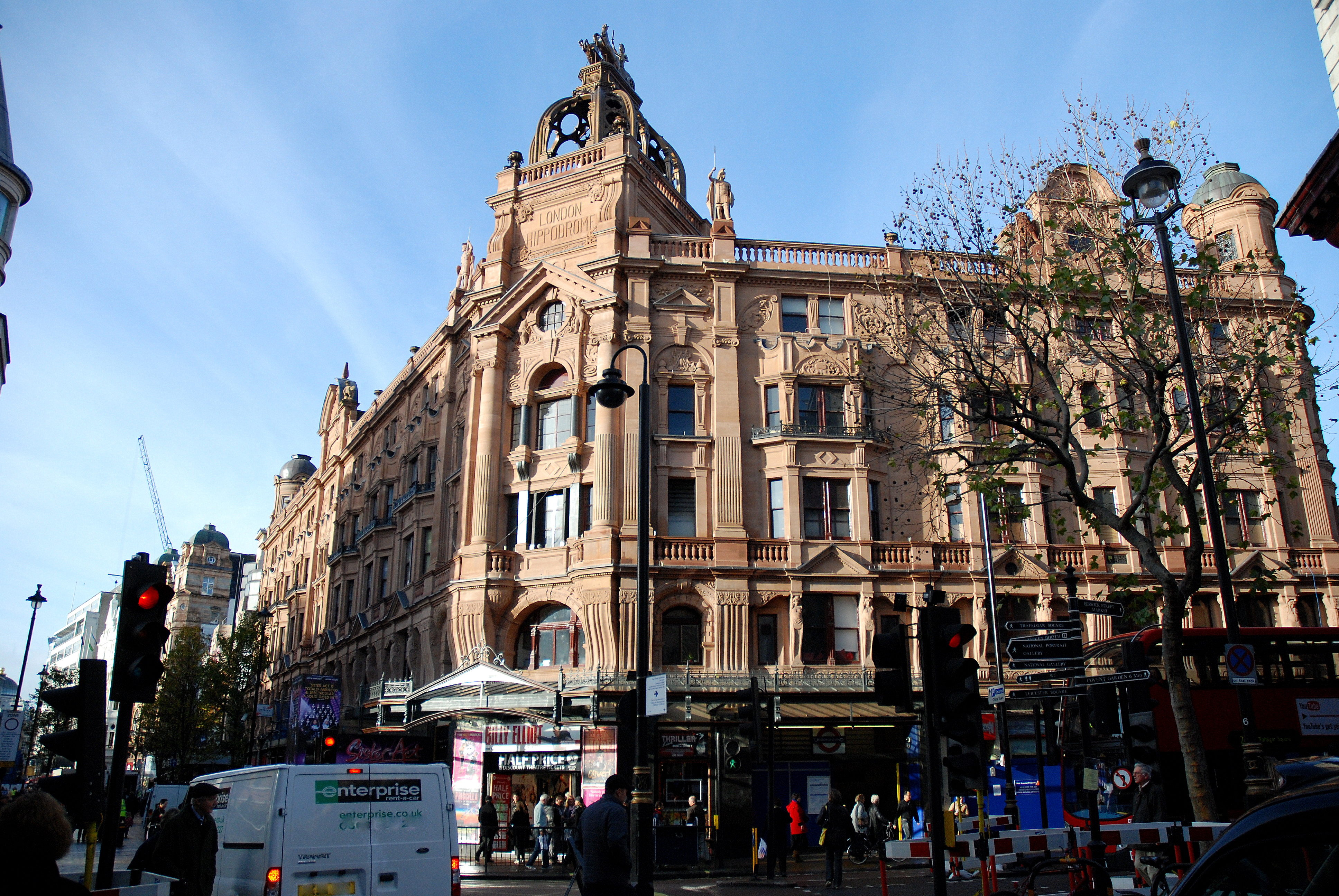 London Hippodrome, theater op de hoek van Charing Cross road and Leicester square te Londen